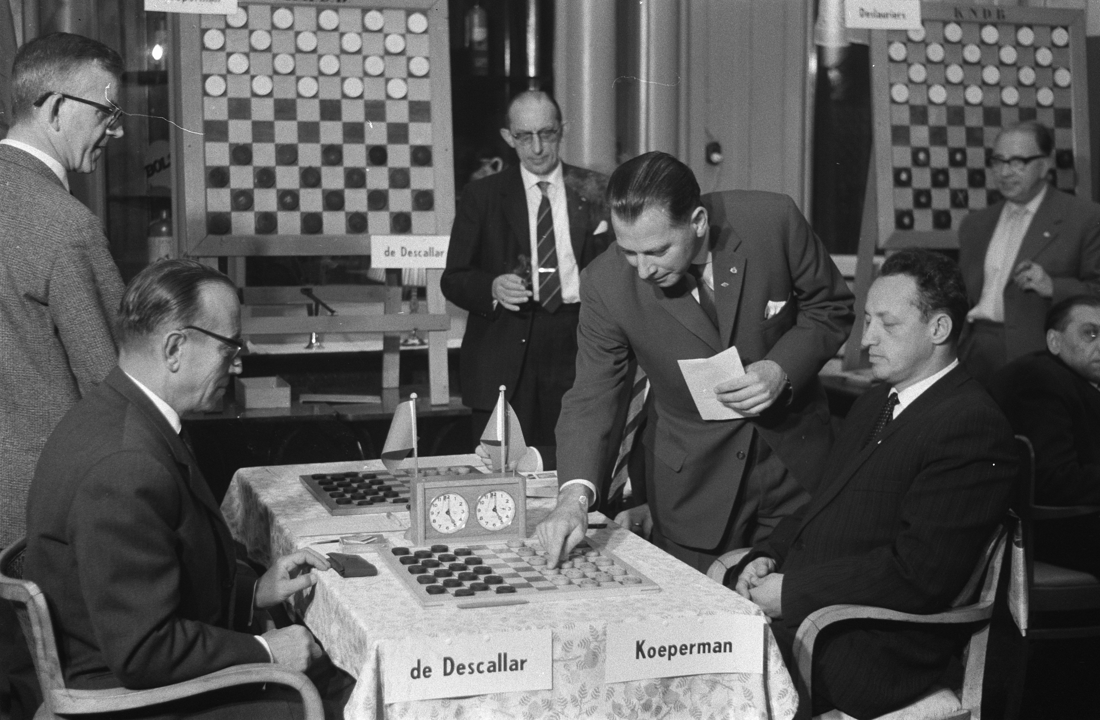 Wereldkampioenschap dammen te Amsterdam, eerste zet op het bord van de Descallar en Koepermann